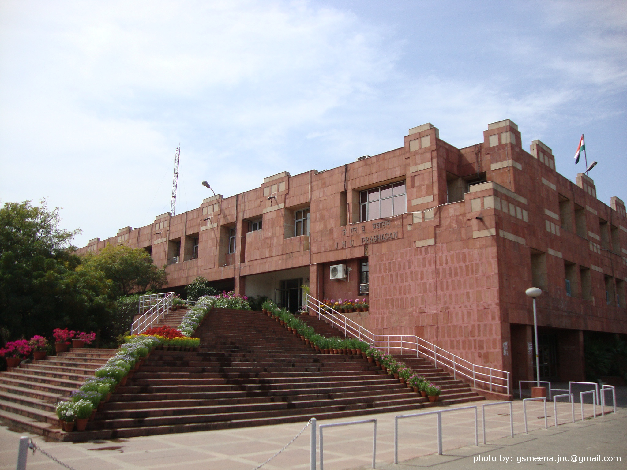 प्रशासन भवन, जवाहरलाल नेहरू विश्‍वविद्यालय